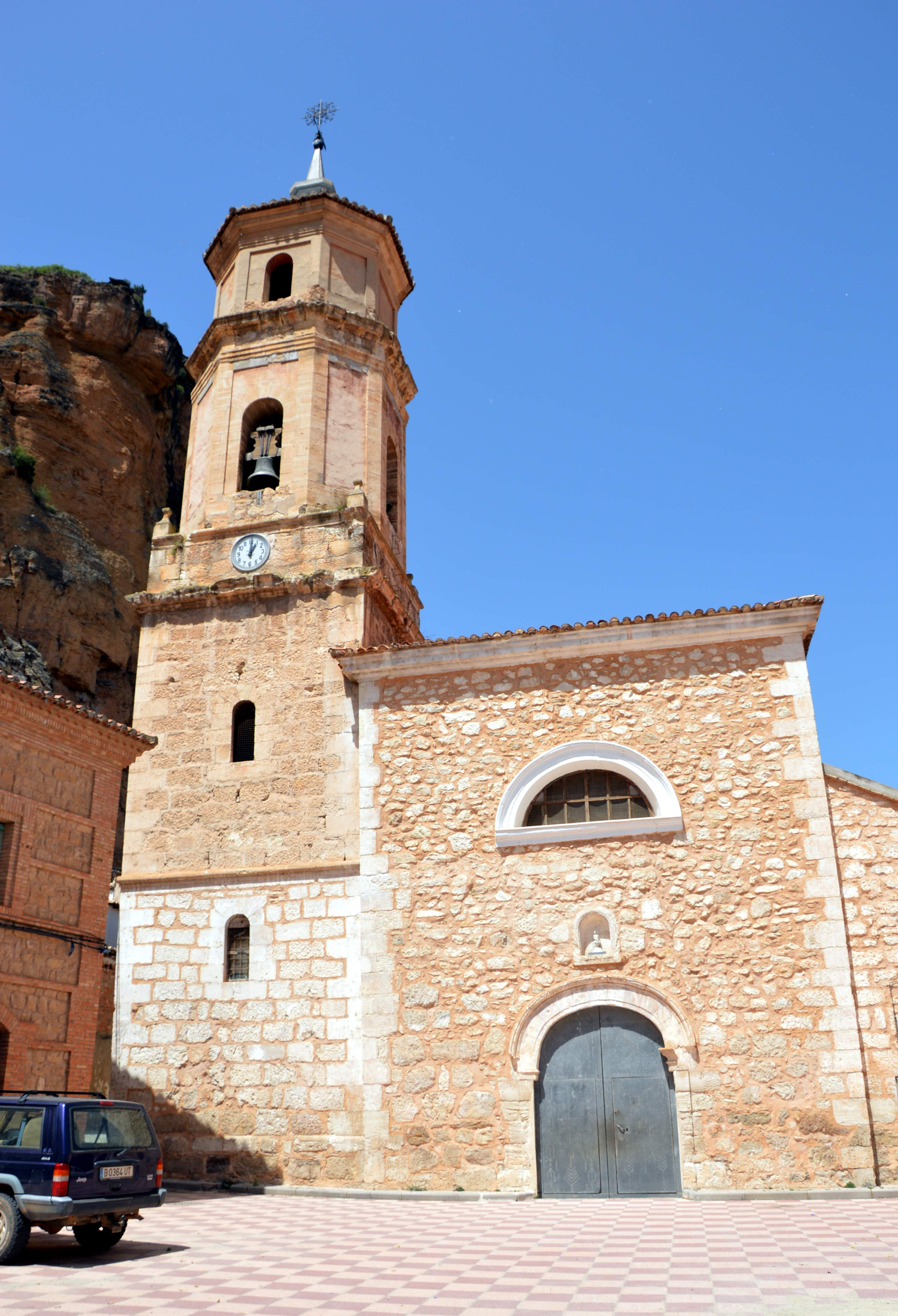 Vista frontal de la iglesia parroquial de Libros (Teruel), 2017.